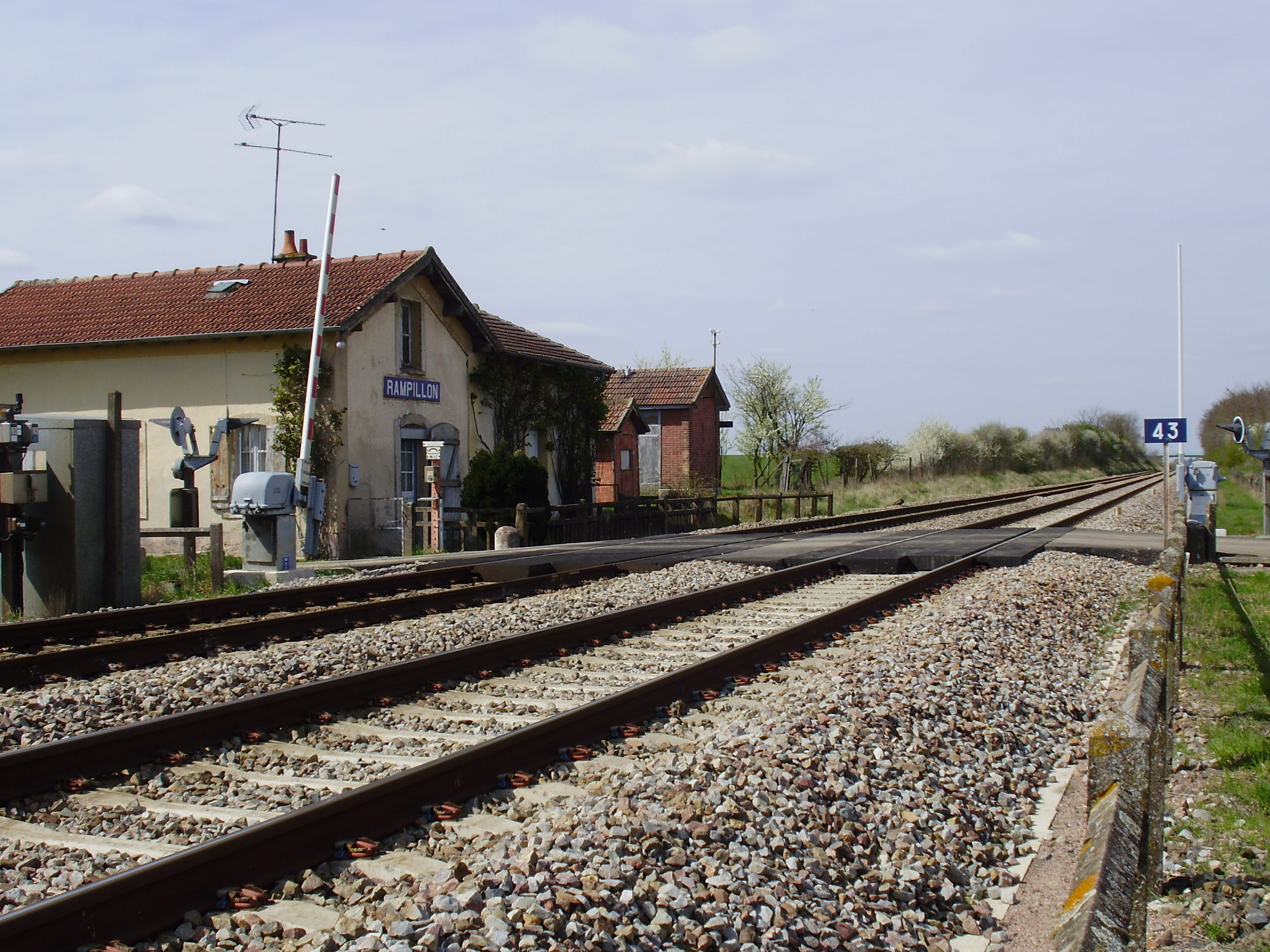 Ancienne halte de Rampillon, Seine-et-Marne, France : vue d'ensemble en regardant vers Paris